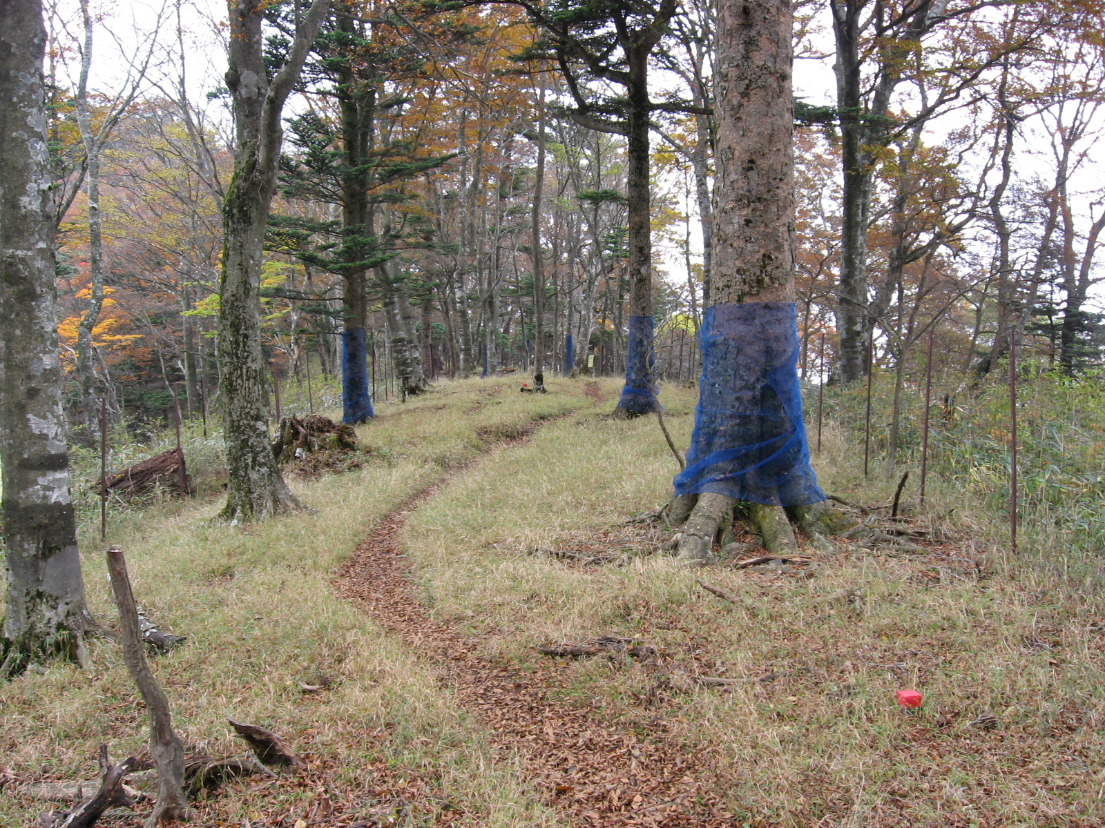 三峰尾根